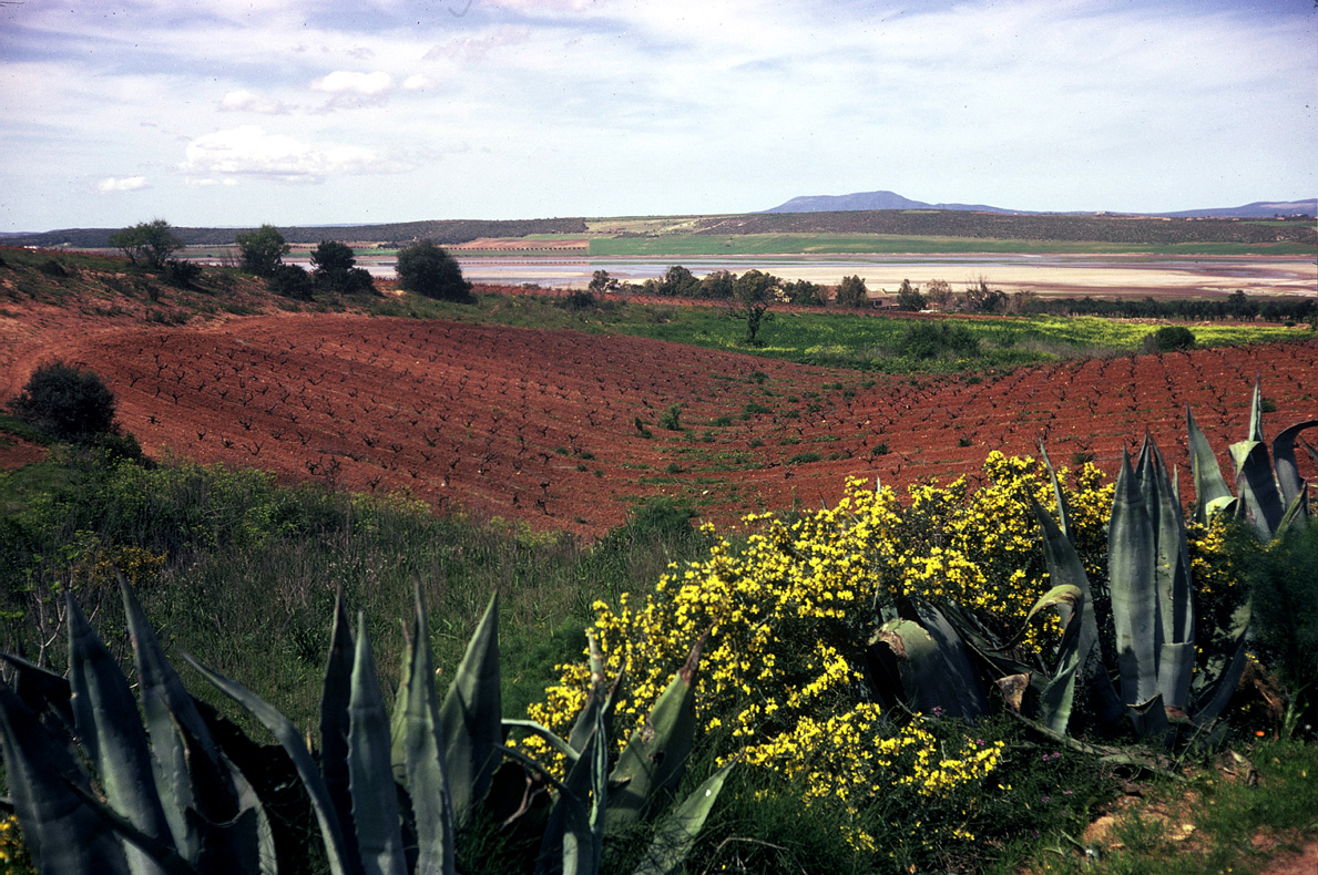 Cultures (vignoble) en périphérie de la Sebkha d'Arzew (26 mars 1974). Dans le lointain : Djebel el Khar ou Montagne des lions, à environ 15 km de la Sebkha.